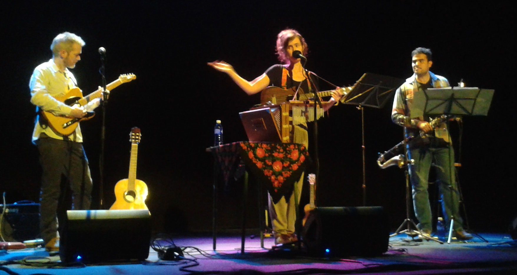 Neighbor musika taldea Donostiako Lugaritzen